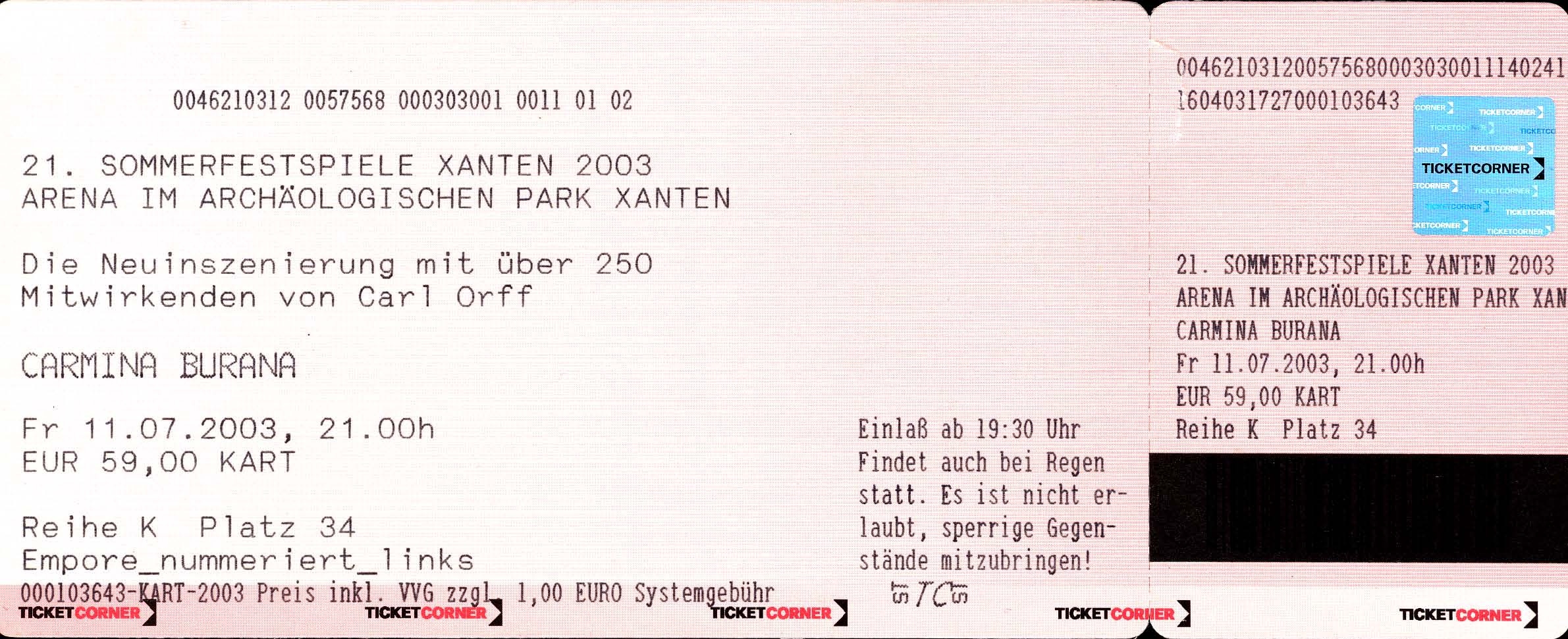 Eintrittskarte für die Aufführung der Carmina Burana in der Arena des Archäologischen Parks Xanten. Ausgestellt durch Ticketcorner via START-System